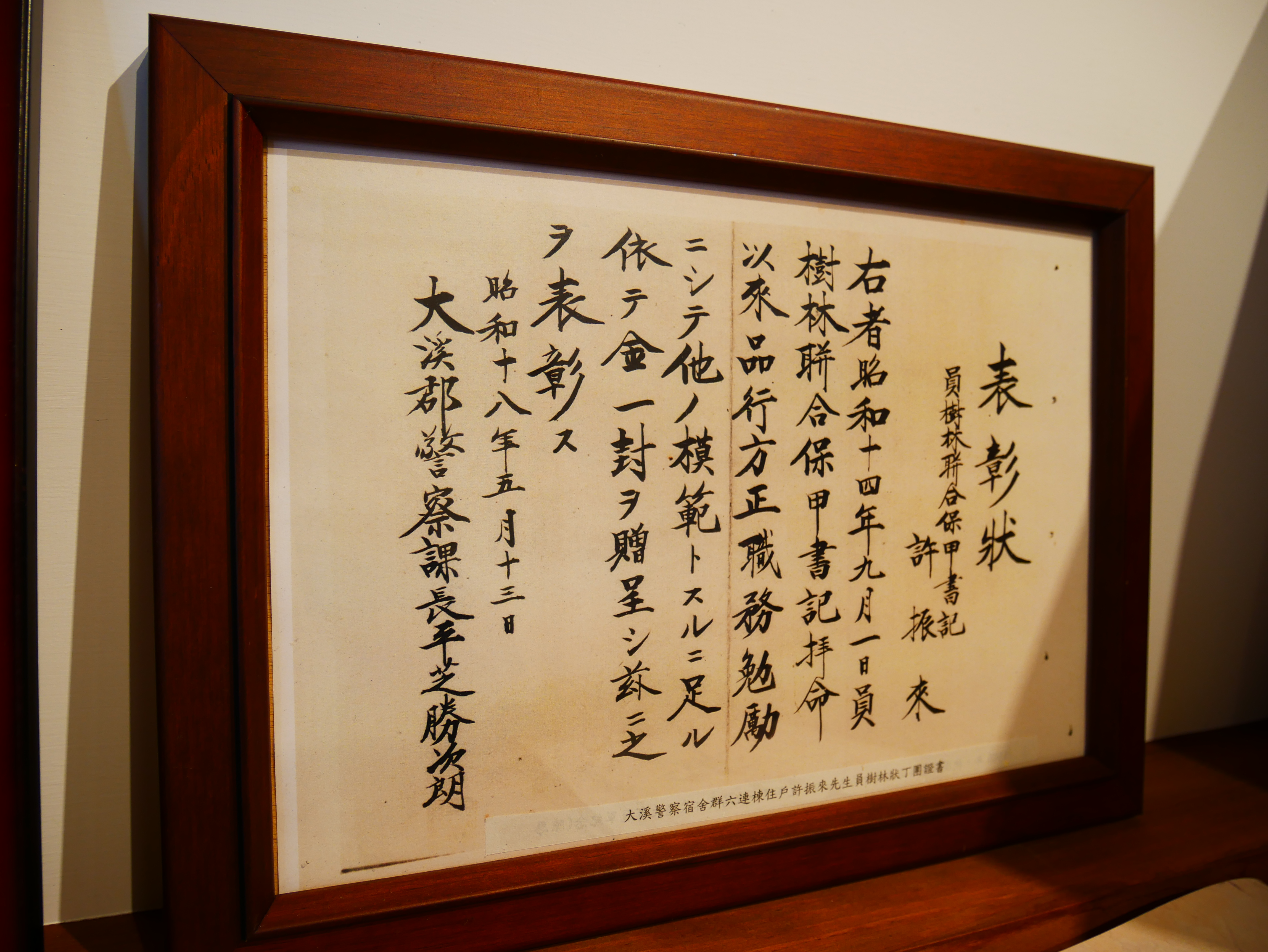 中文（台灣）: 大溪郡警察課長所頒表彰狀，桃園市大溪區興和里